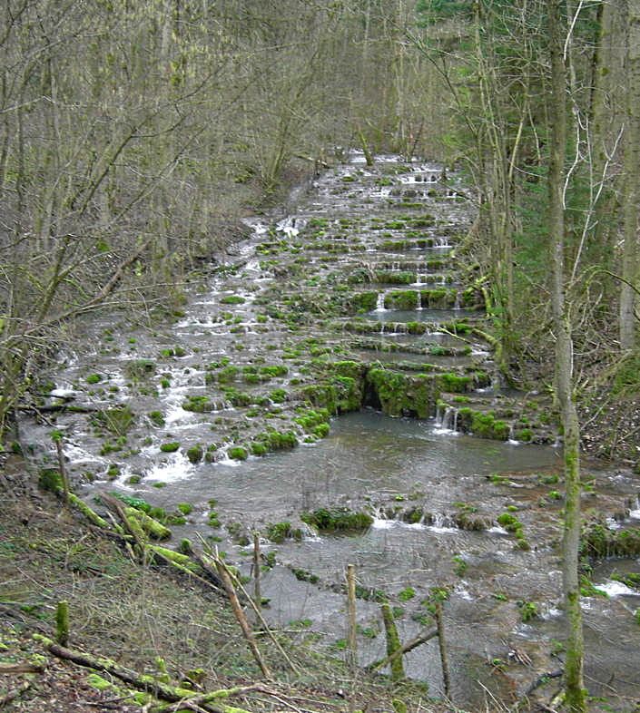 Sinterterassen nach der Quelle der Lillach bei Weißenohe am Frankenweg, Deutschland.